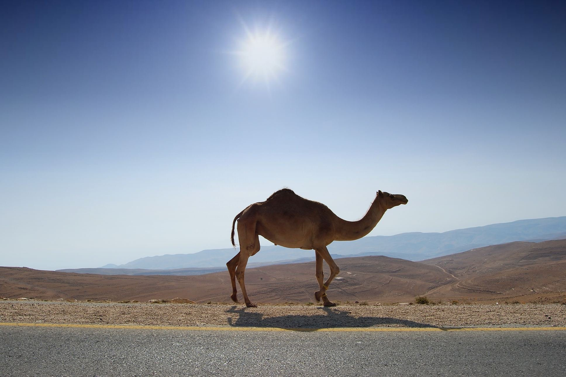 Desert Road Camel by